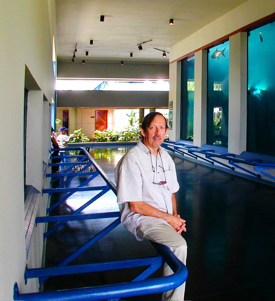 Pedro Borrell en su obra el Acuario Nacional de Santo Domingo, República Dominicana.